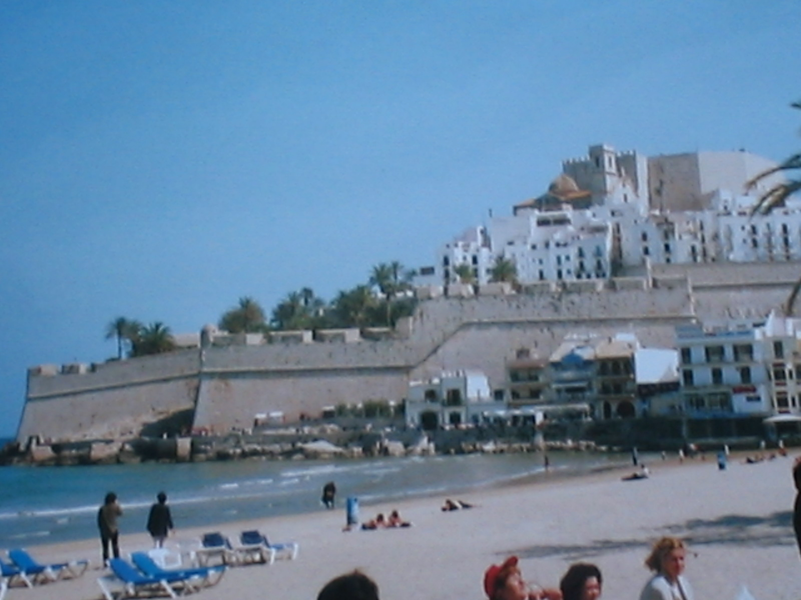 Peñíscola is een toeristisch stadje in Spanje ten noorden van Valencia. Eigen foto, jaren terug